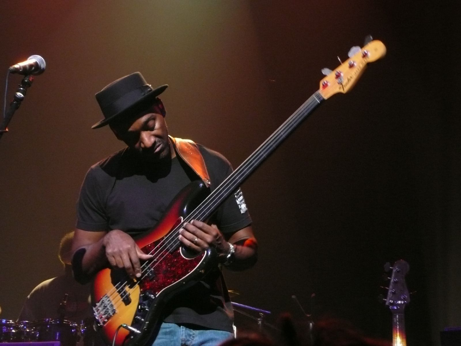 Live @ Ancienne Belgique 23.10.2007